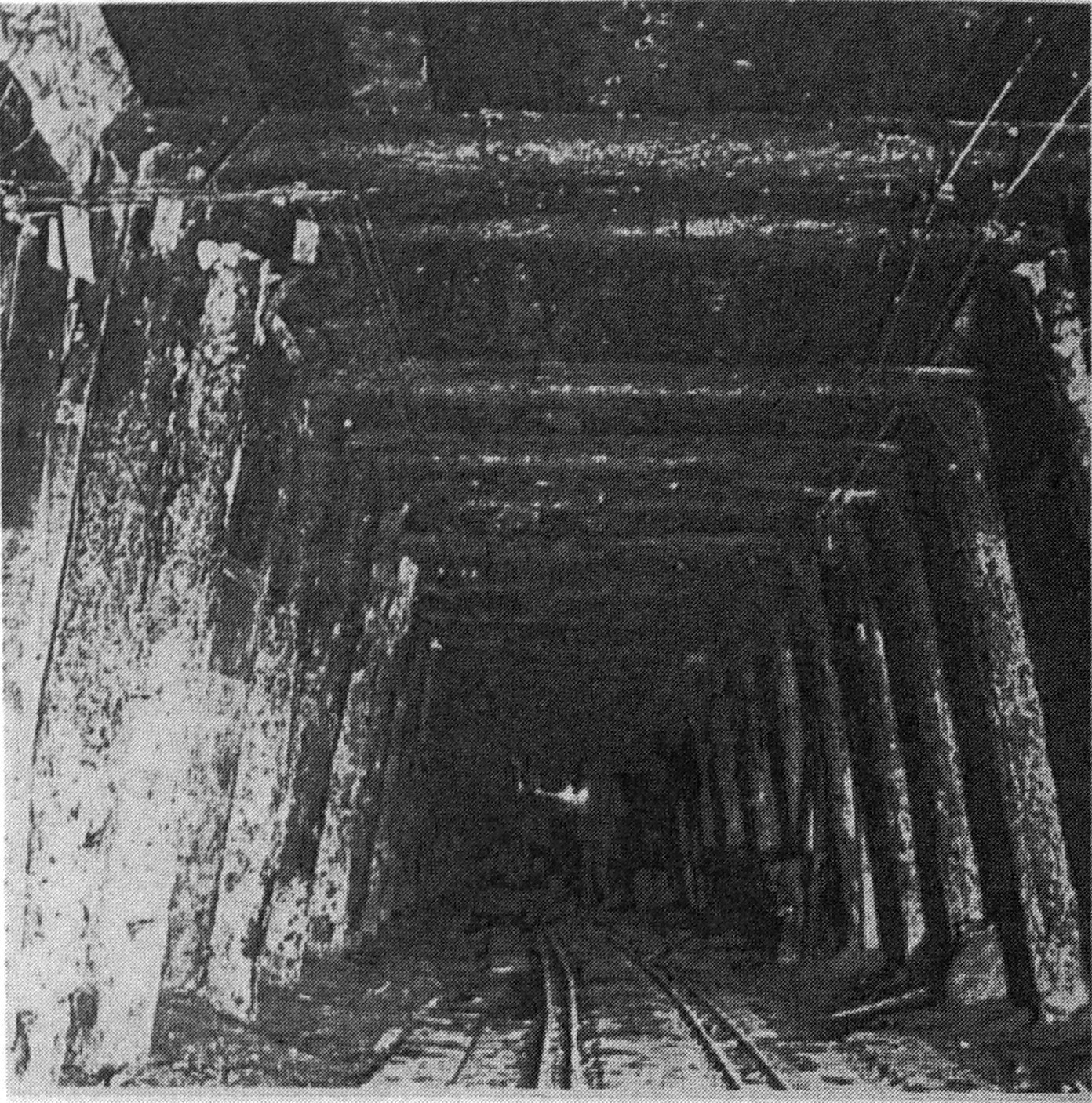 lors de la bataille des monts de champagne.